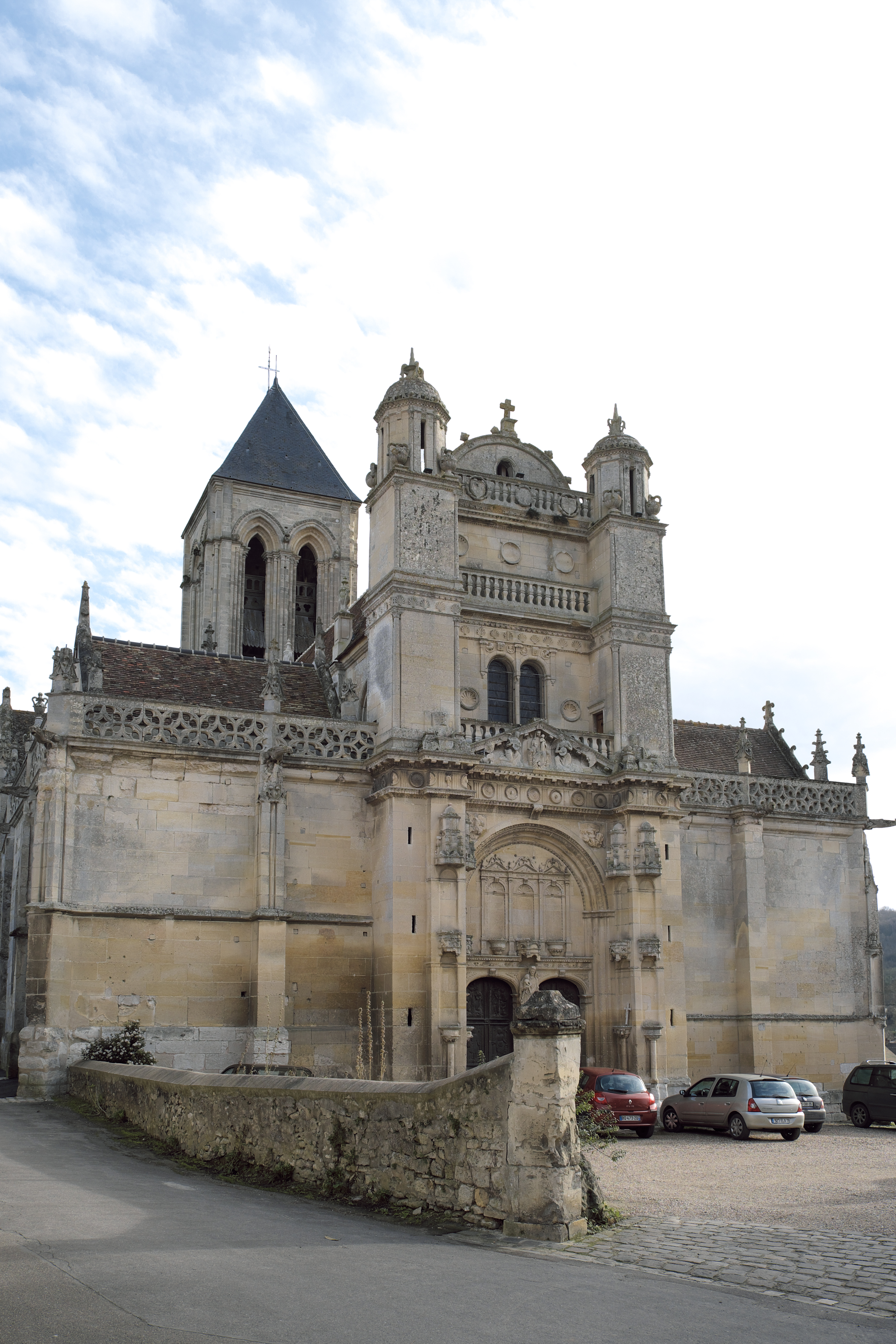 Katholische Pfarrkirche Notre-Dame in Vétheuil im Département Val-d’Oise in der Region Île-de-France (Frankreich), Westfassade